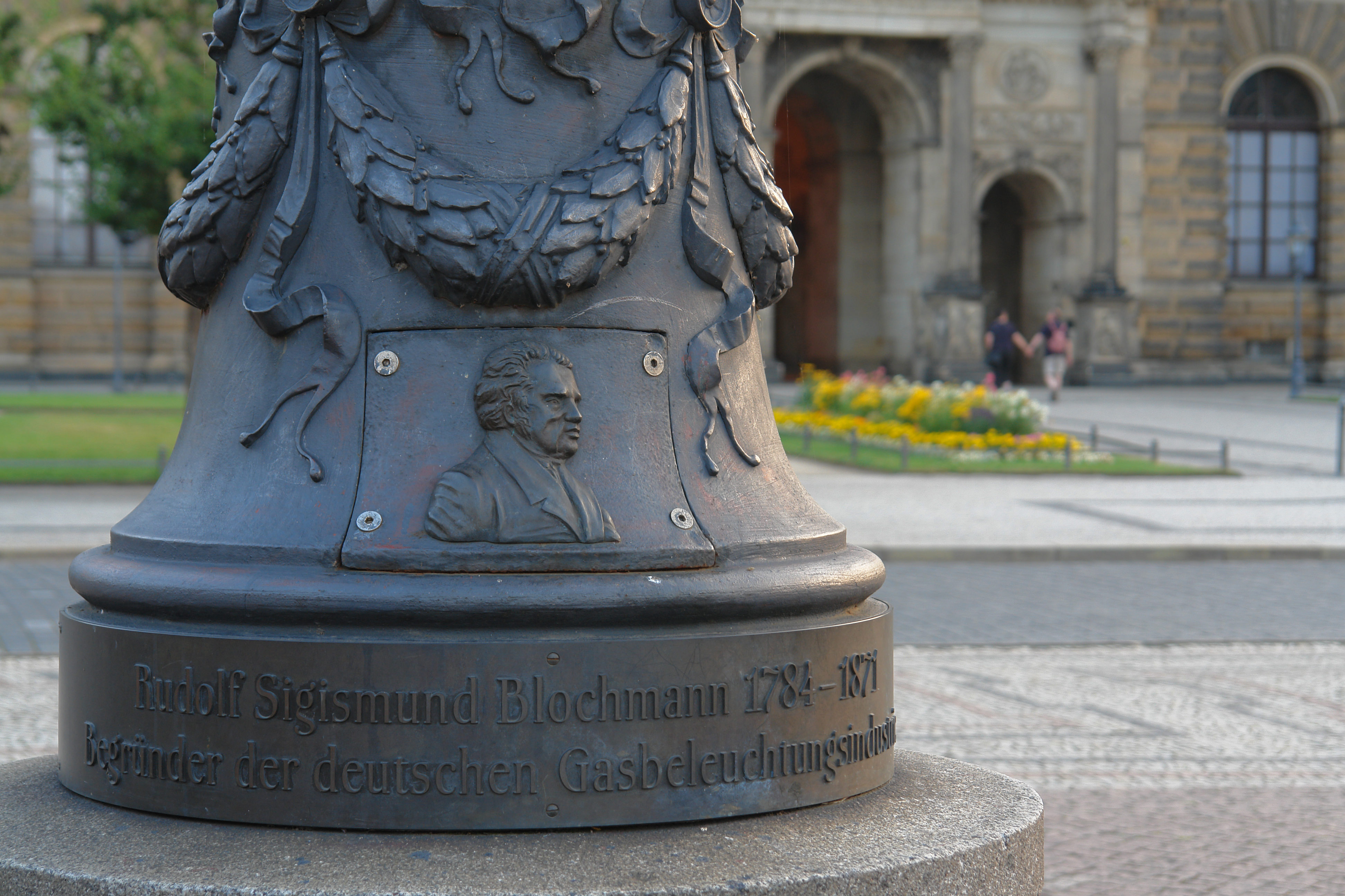 Gedenktafel für Rudolf Sigismund Blochmann